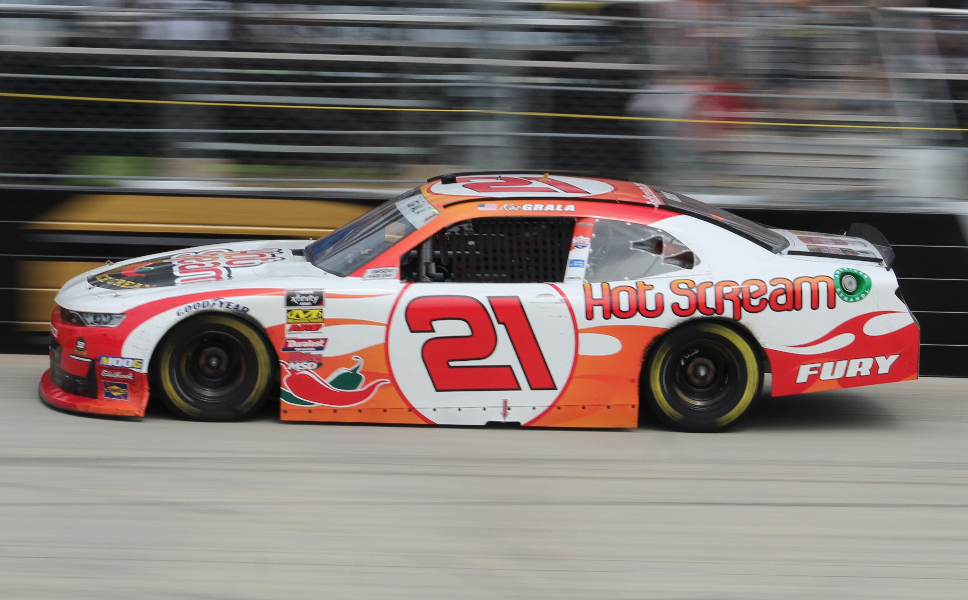 2019 Gander RV 400